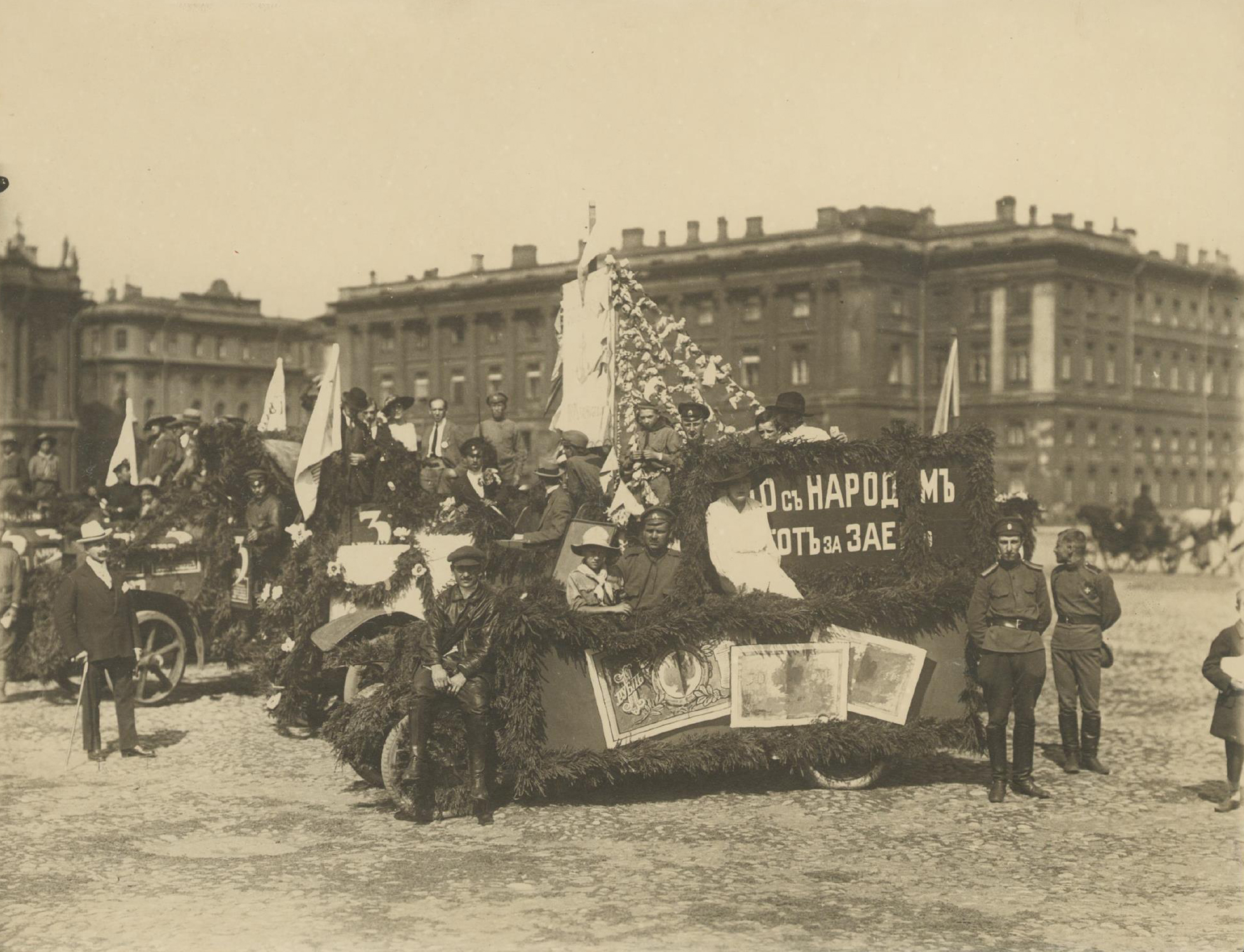 Заем свободы. На Дворцовой площади в Петрограде в мае 1917 г